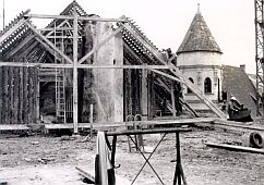 Bild bildet einer der zahlreichen Umbauten am Schloss ab